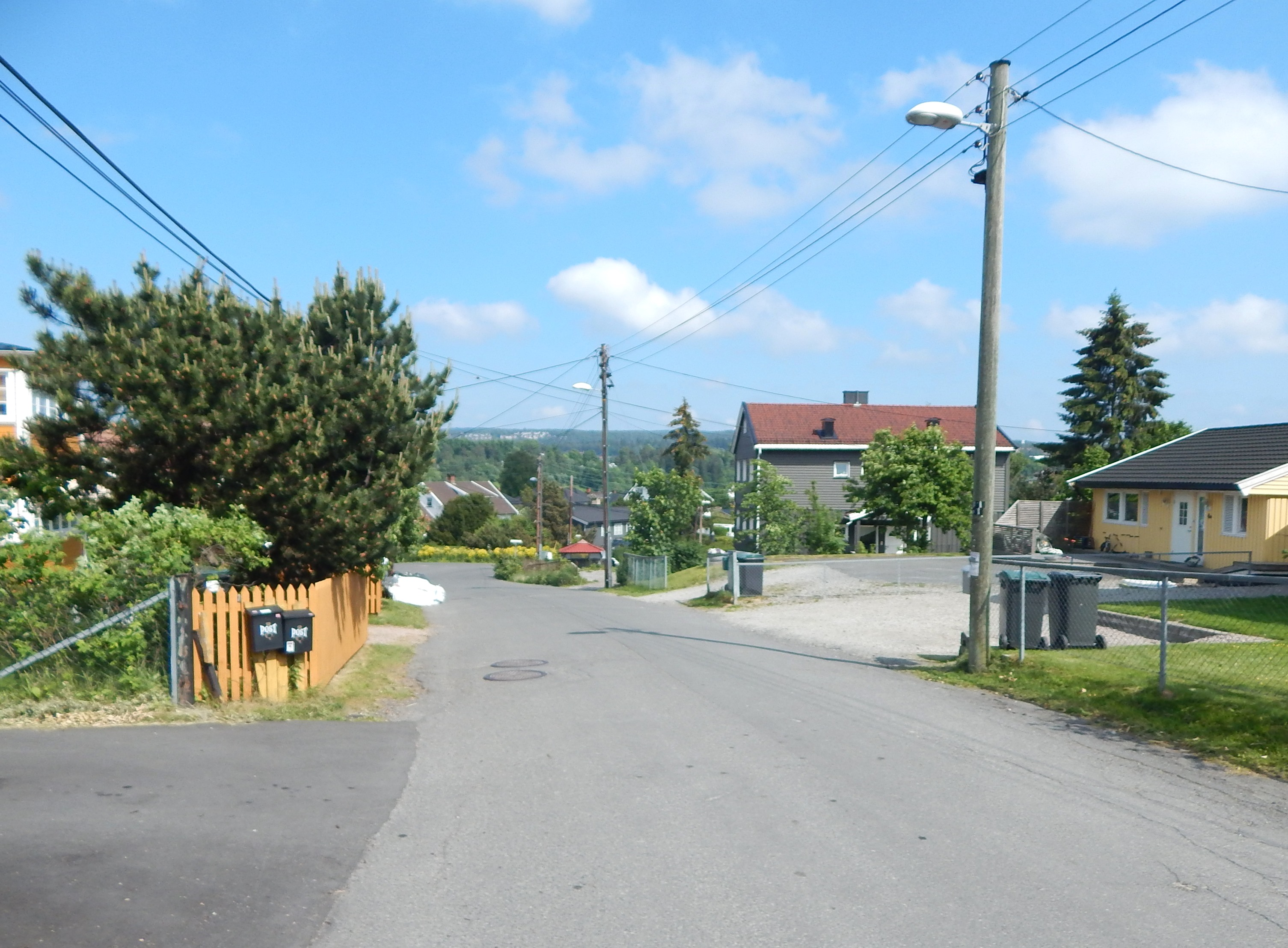 Kildals vei